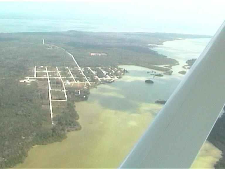 Luftbild Copperbank